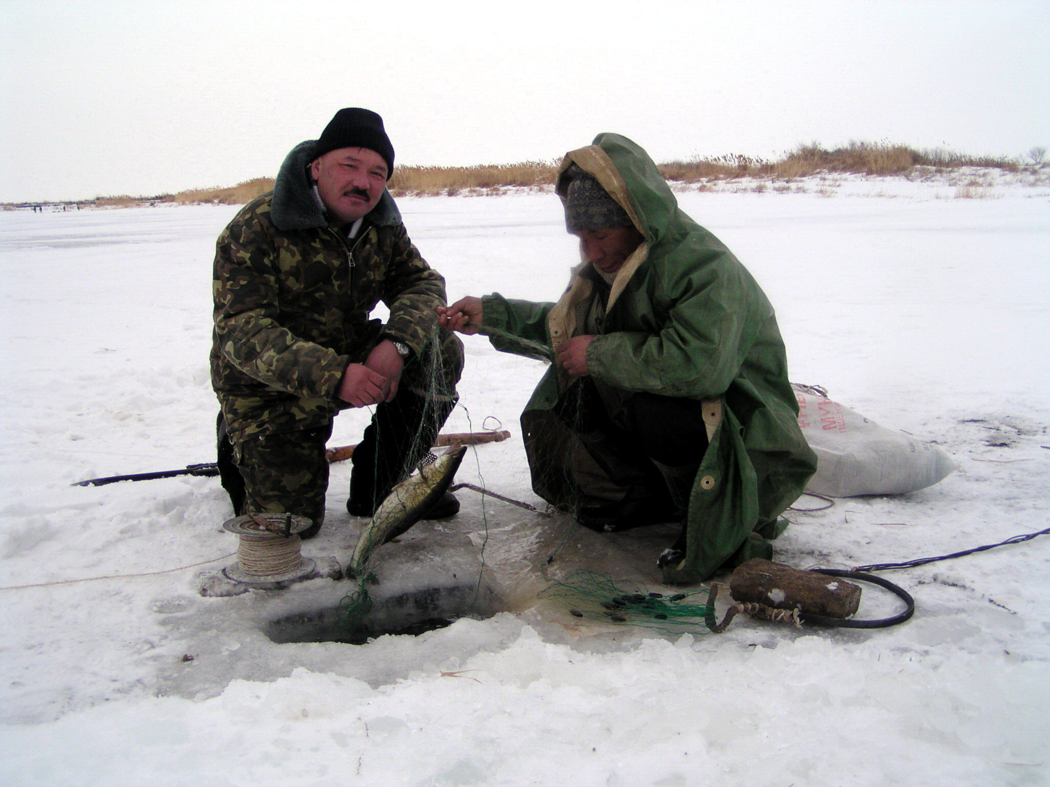 Winter fishing on Syr-Darya river (Qyzylorda province of Kazakhstan). Winter 2006 year. Зимняя рыбалка в нижнем течении реки Сырдарья (Кызылординская область Казахстана). Зима 2006 года. User:Yuriy75